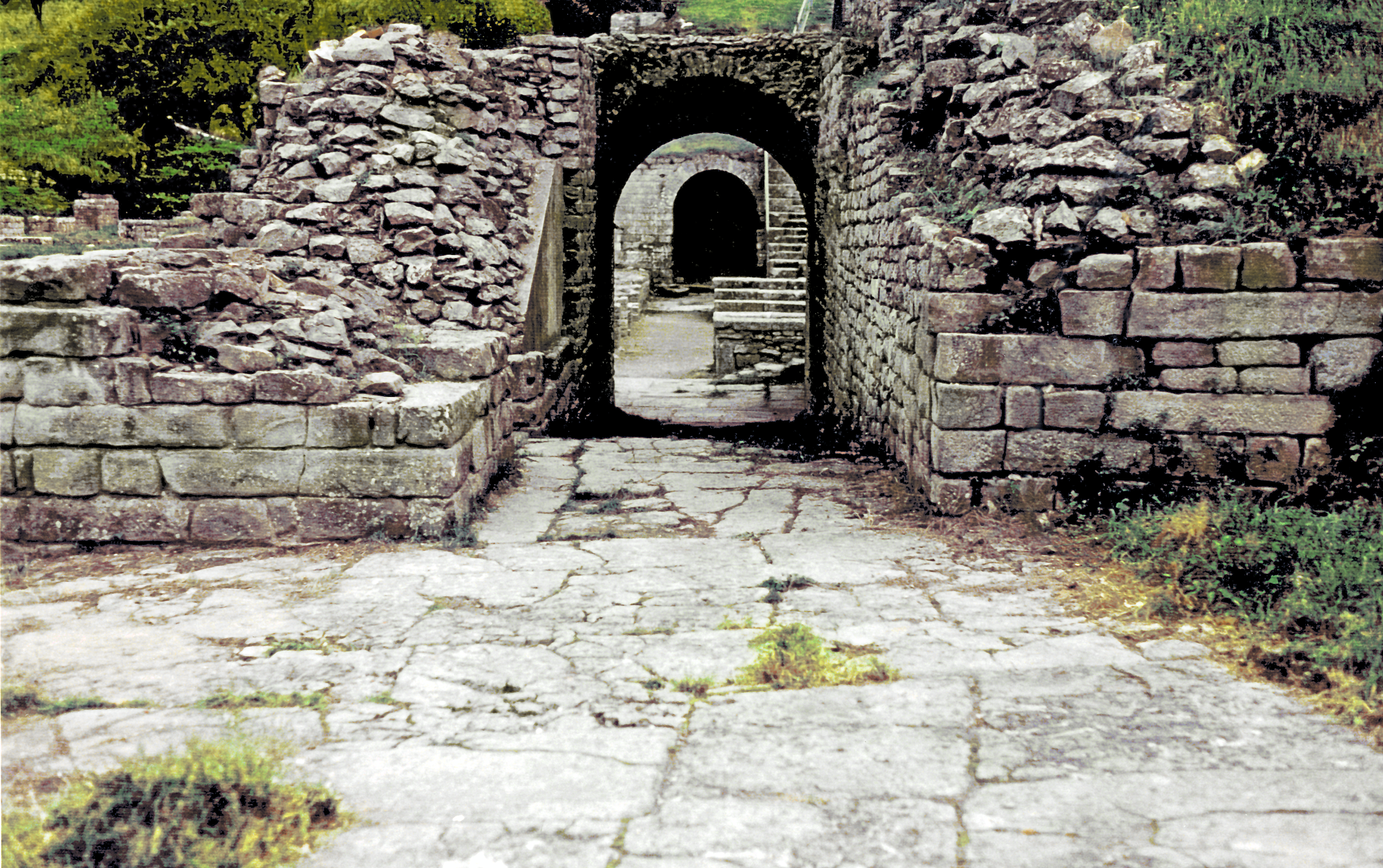 Fiesole (Toskana, Italien) - Archäologische Zone - Theater.